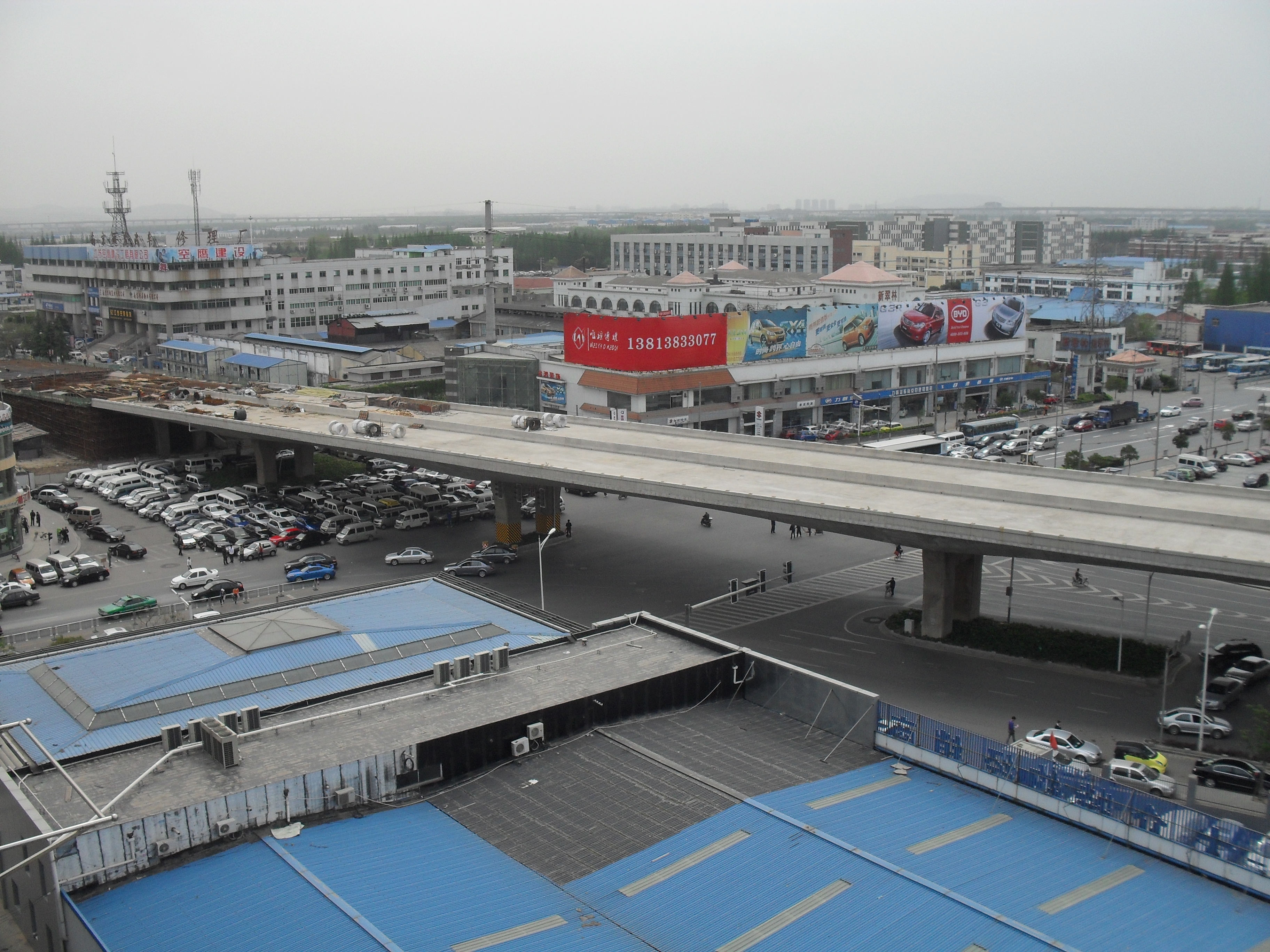 南京明通家园看应天大街高架桥